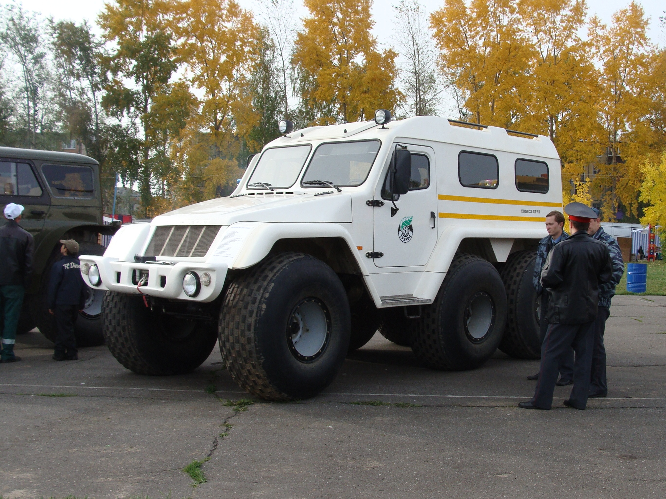 День работников леса. Коряжма 2010